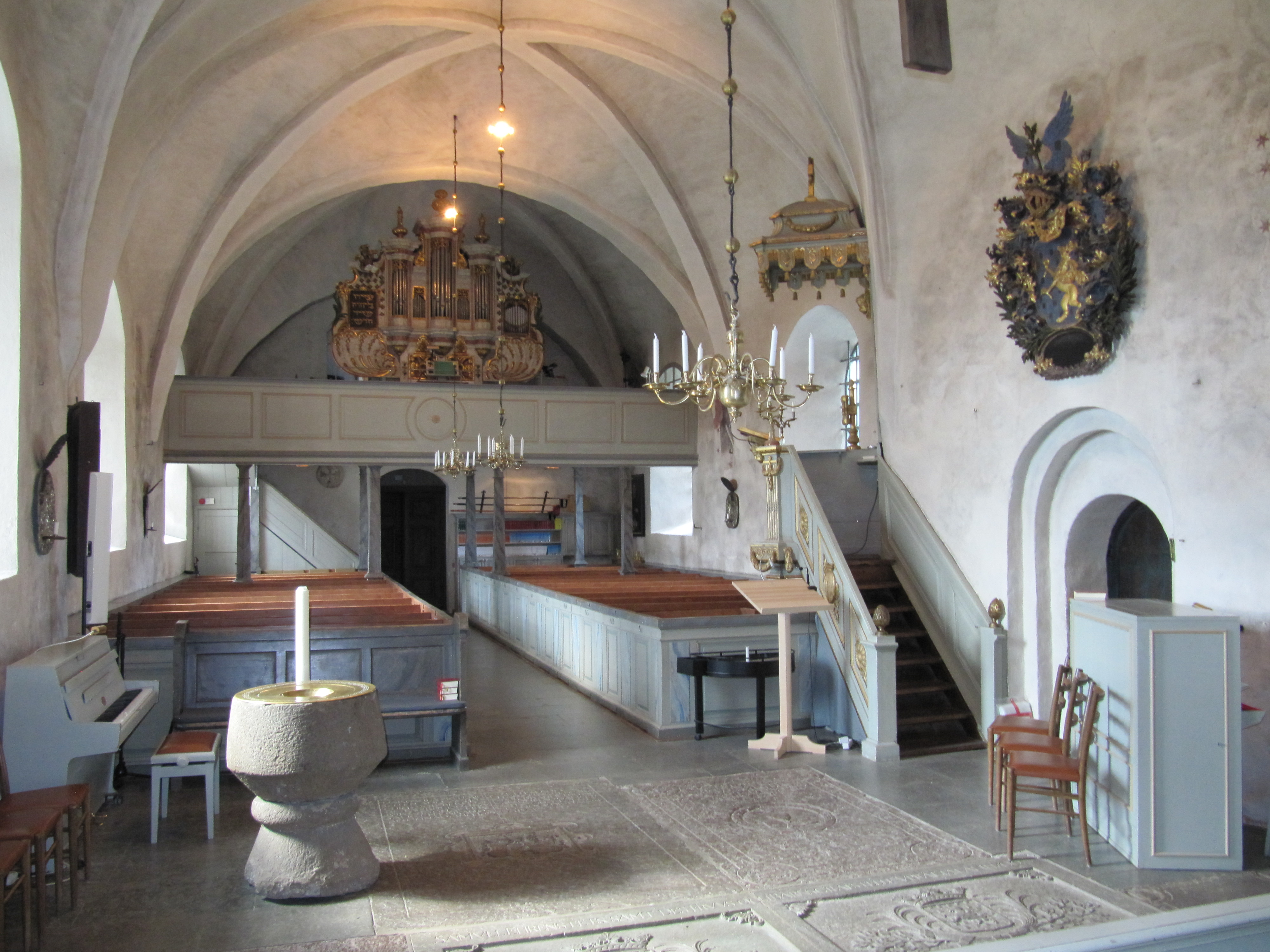 Kyrkorum i riktning mot orgelläktare i Fresta kyrka